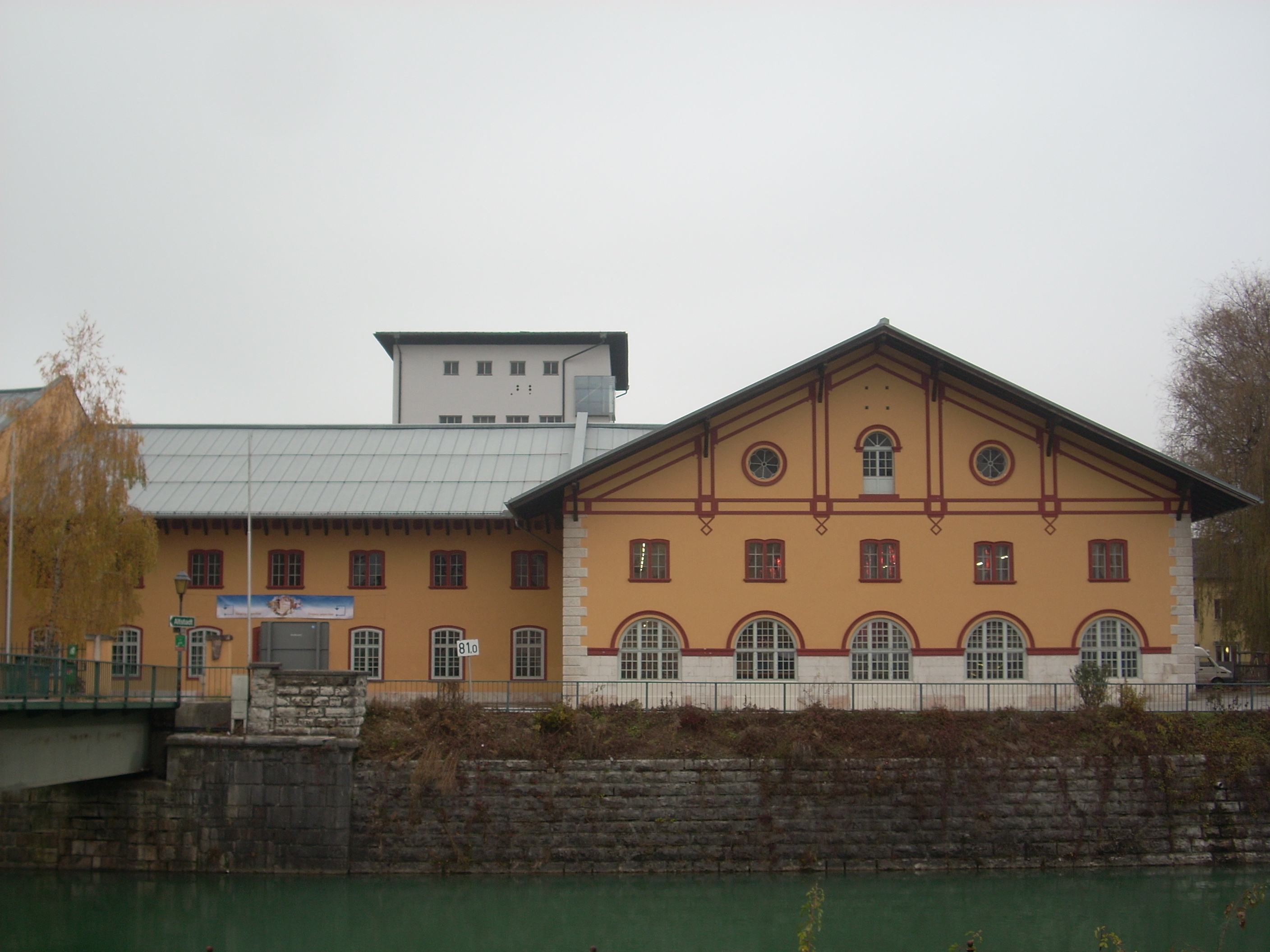 Salinengebäude auf der Pernerinsel, Hallein: alter Teil, Sudhaus; nunmehr u.a. eine Spielstätte der Salzburger Festspiele